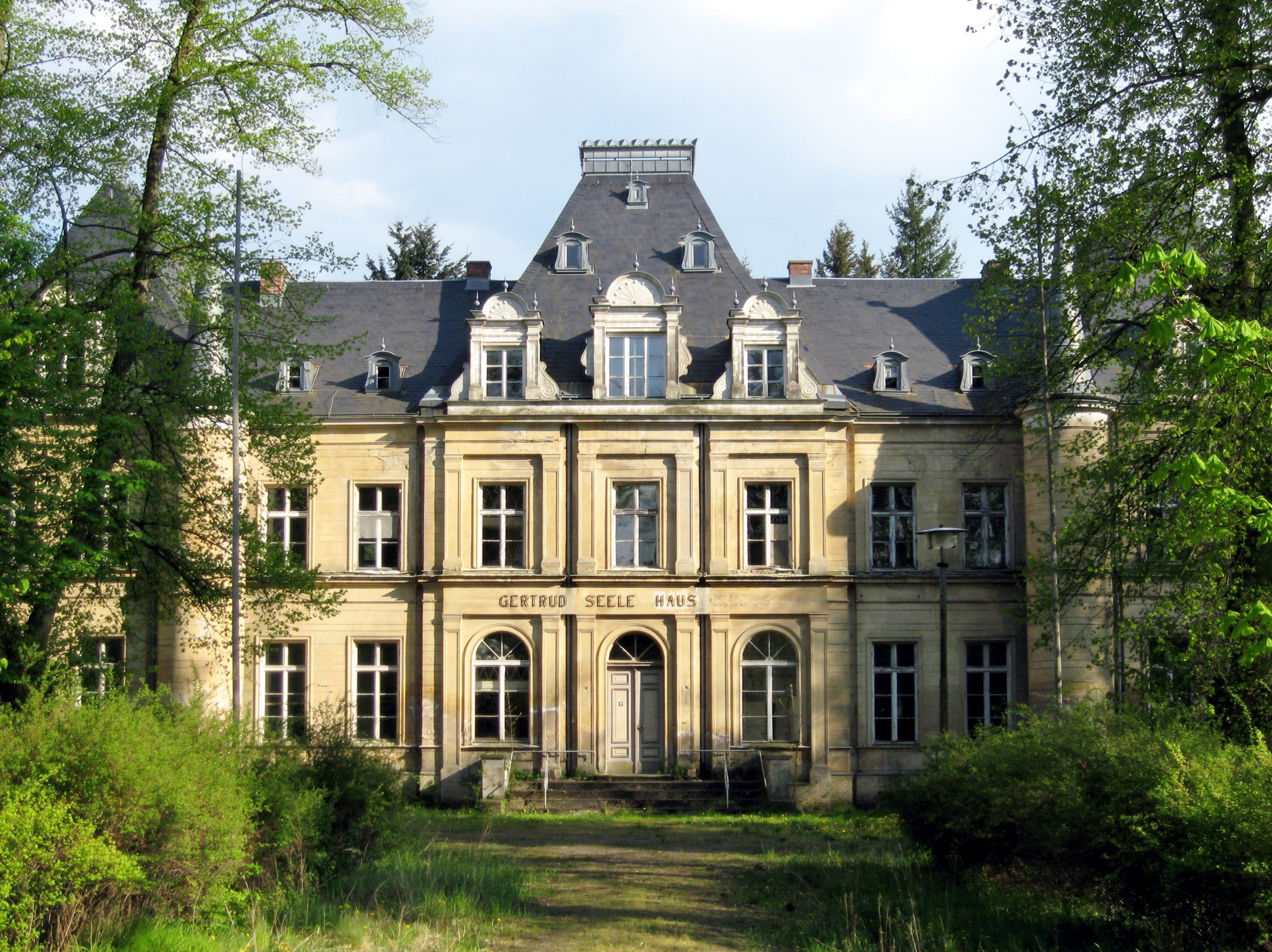 Schloss des Ortes Lanke in der Gemeinde Wandlitz, Landkreis Barnim, Land Brandenburg, Deutschland